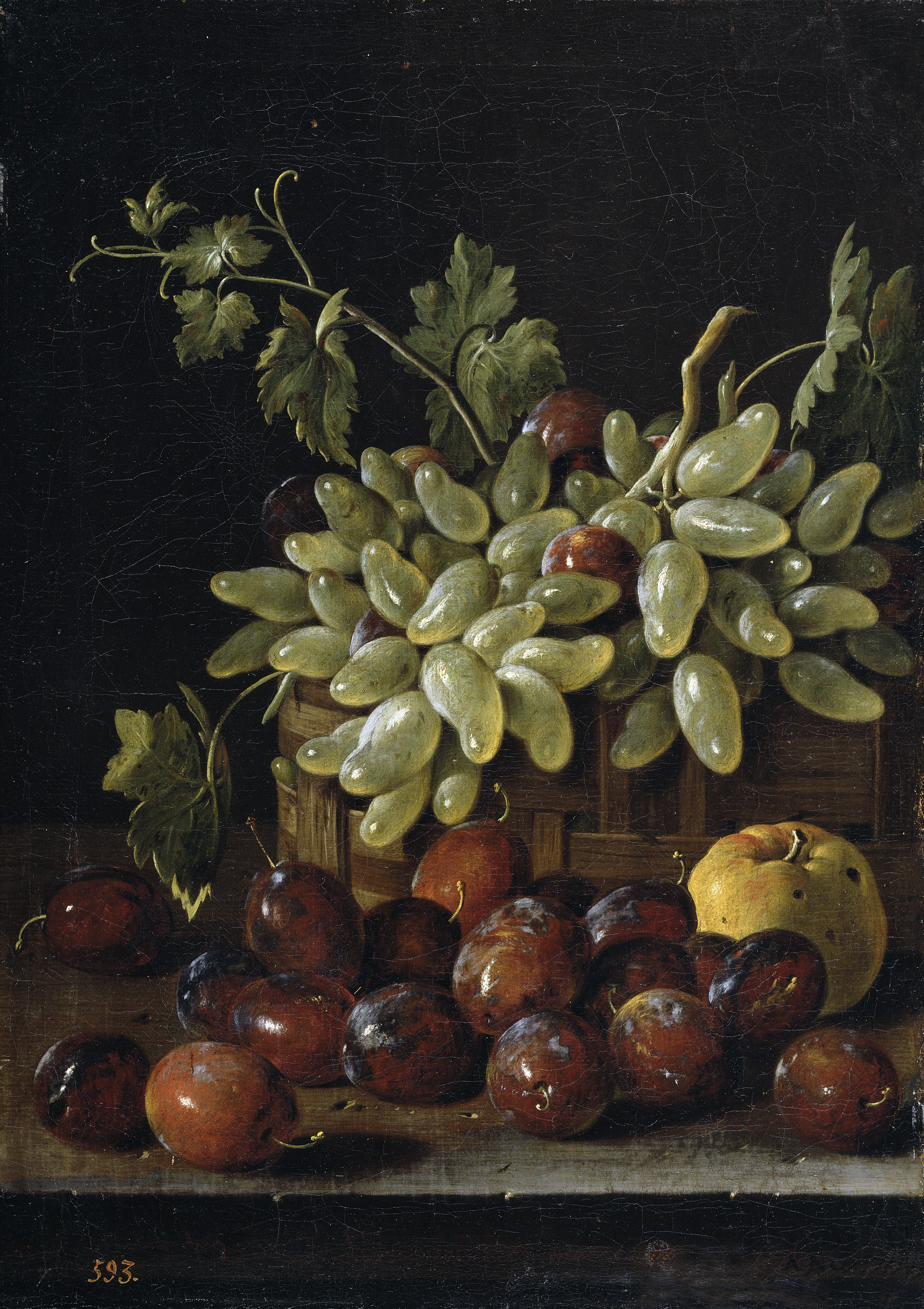 Frutero: ciruelas, uvas y manzanas, pintura al óleo de Luis Egidio Meléndez conservada en el Museo del Prado, Madrid.